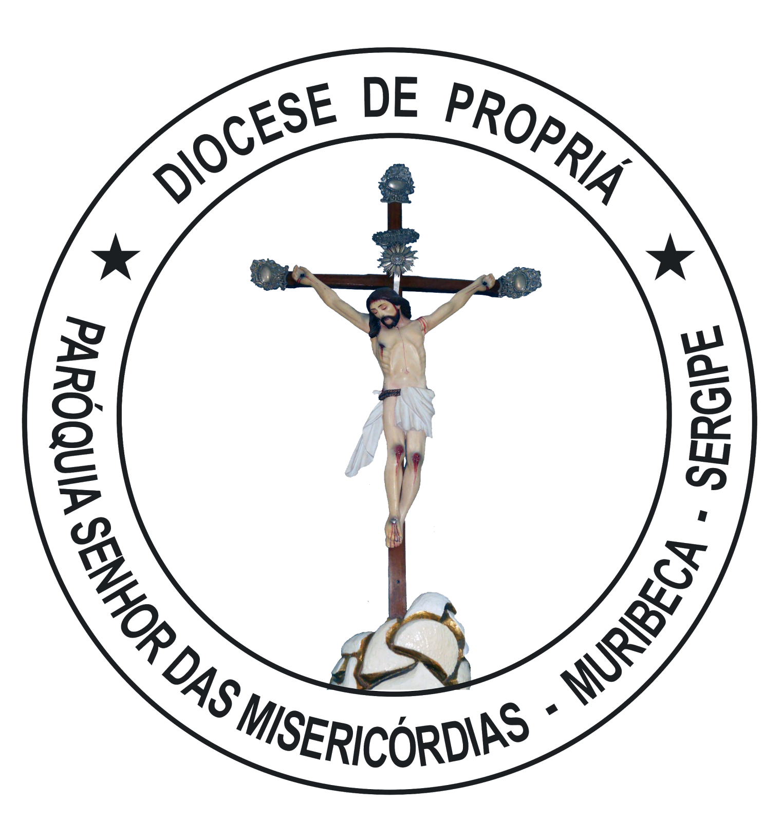 selo da paroquia senhor das misericordias